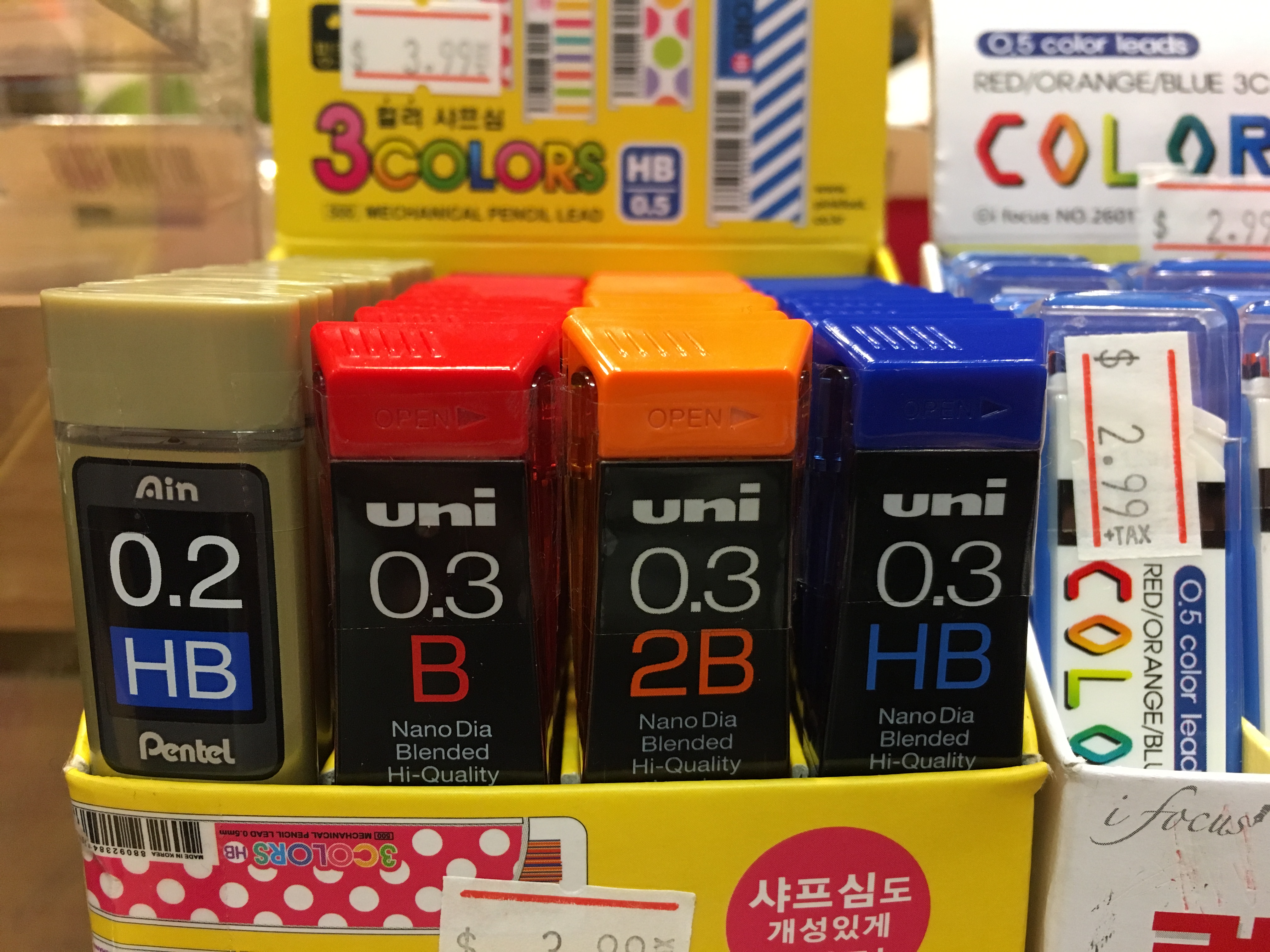 Mechanical pencil leads